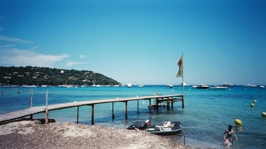 Plage de Pampelone Saint Tropez